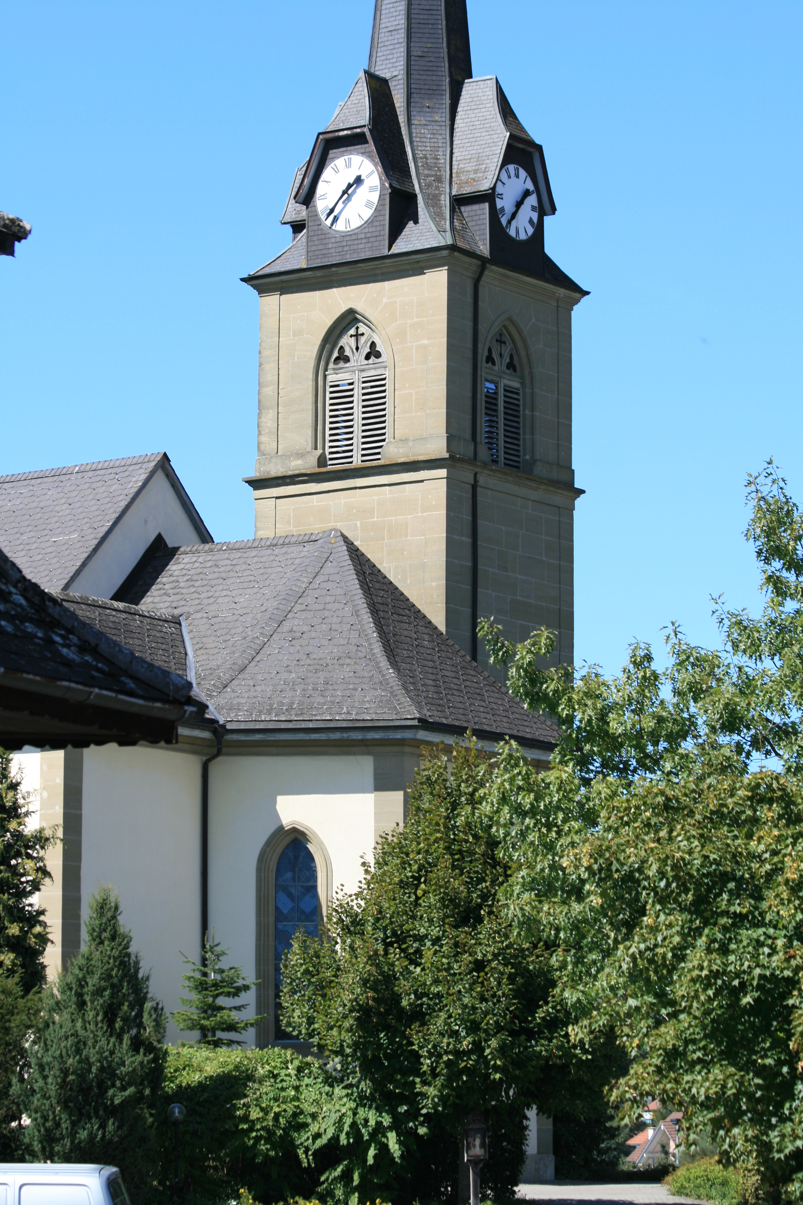 Römisch-katholische Kirche Alterswil, Kanton Freiburg, Schweiz